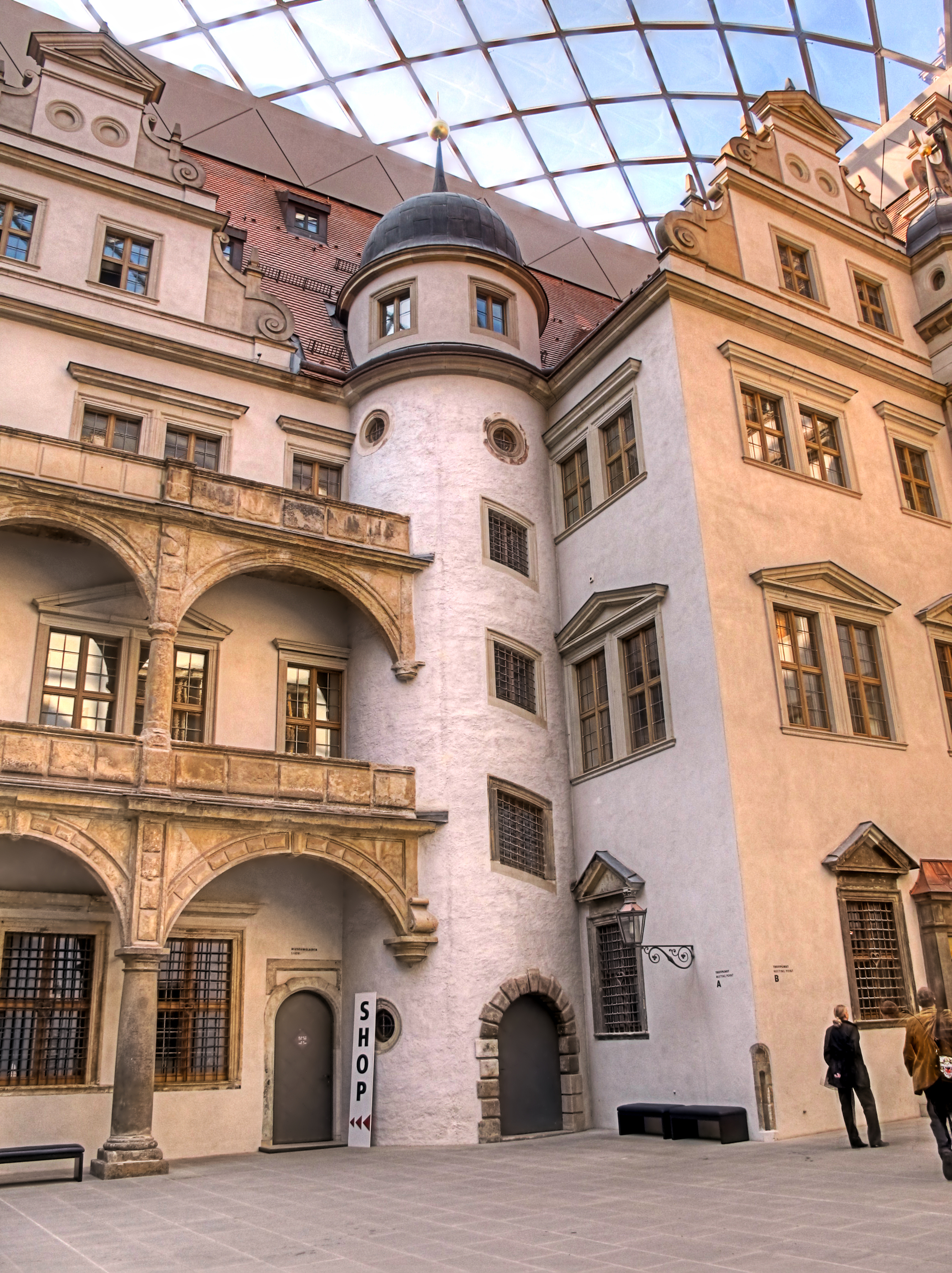 Dresden, Sachsen, Residenzschloss, Überdachter Lichthof